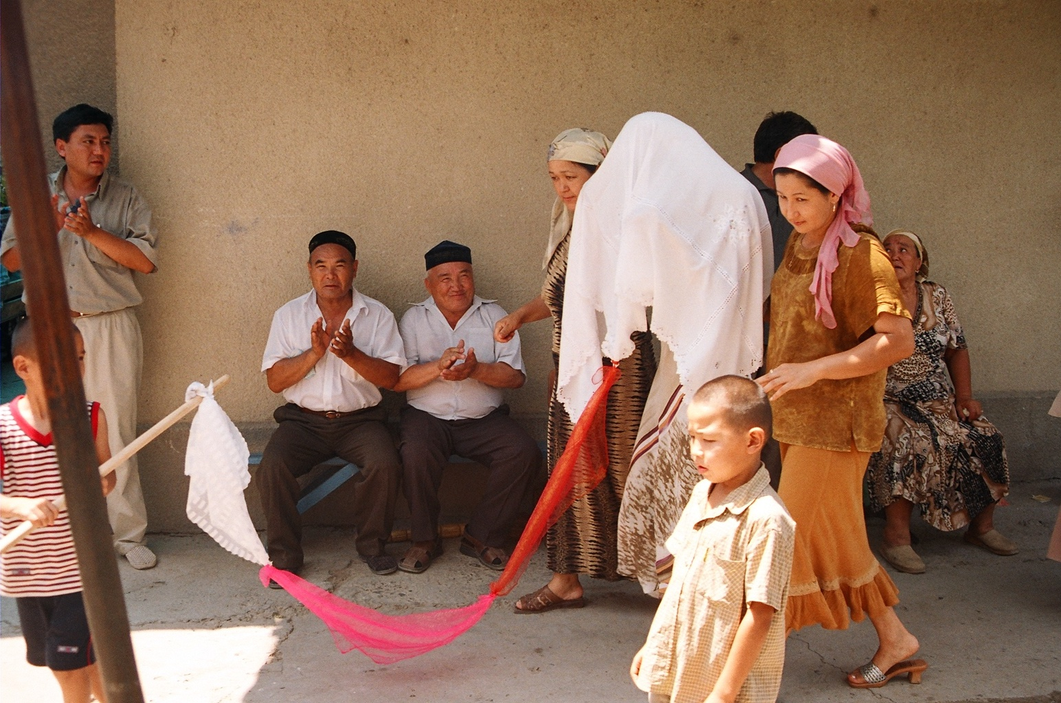 Свадебные обряды казахов.